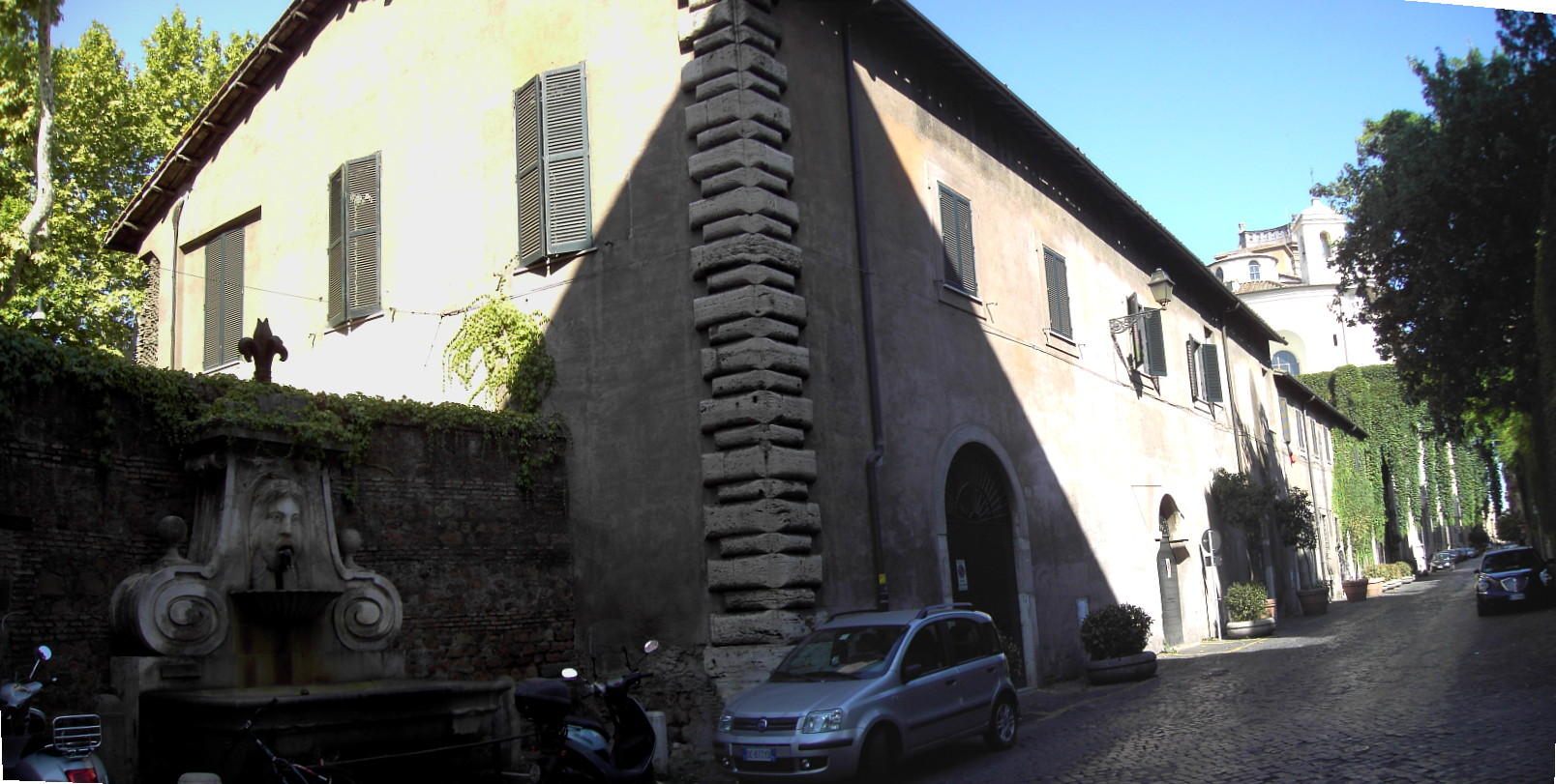 Roma, via Giulia e Fontana del Mascherone